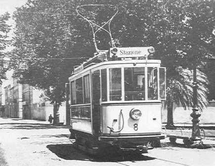 Tram Pisa - vettura 8